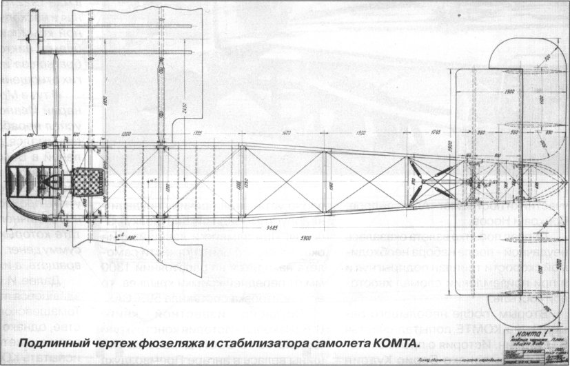 Чертёж фюзеляжа КОМТА